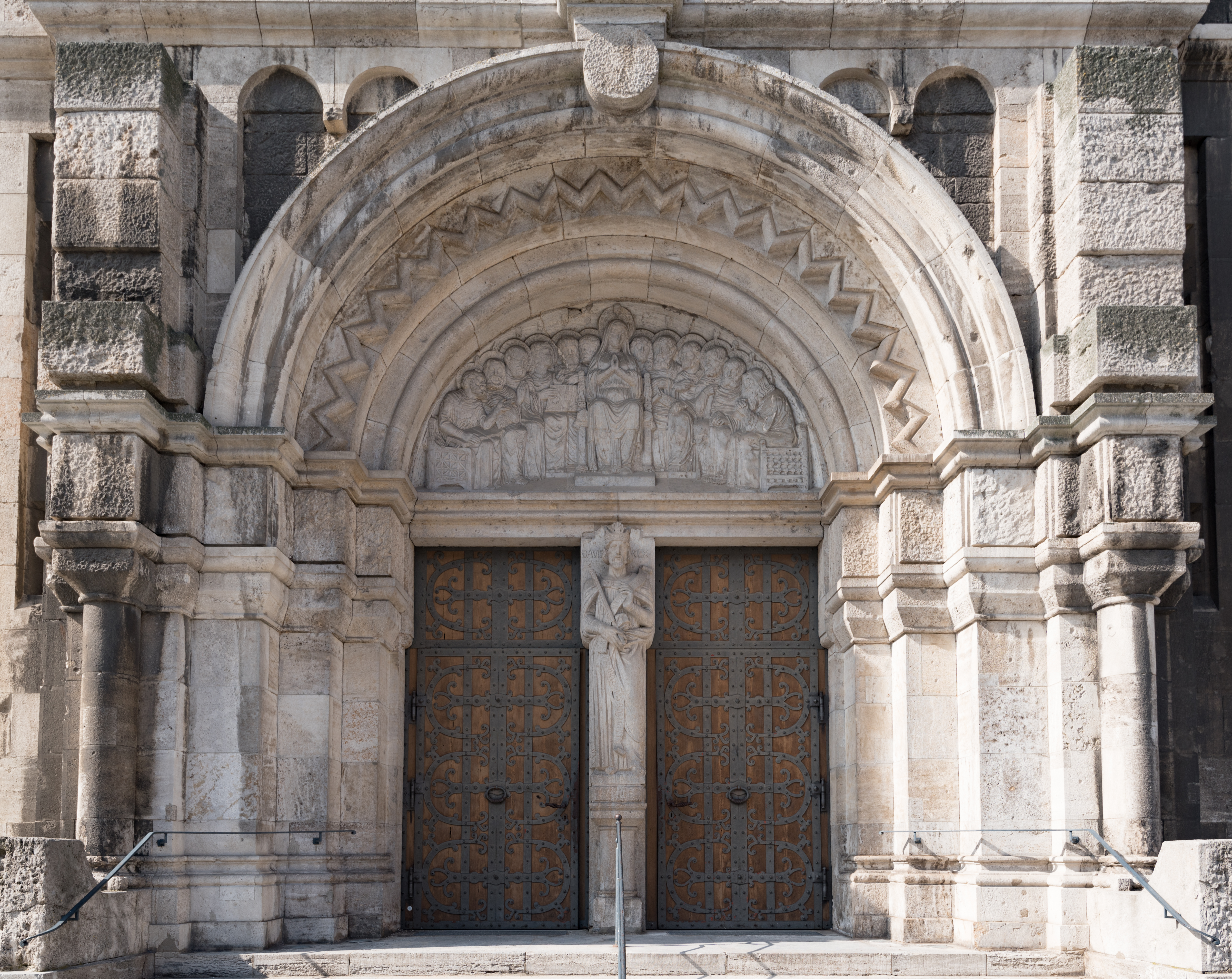 Schweinfurt , Anton-Niedermeier-Platz 1